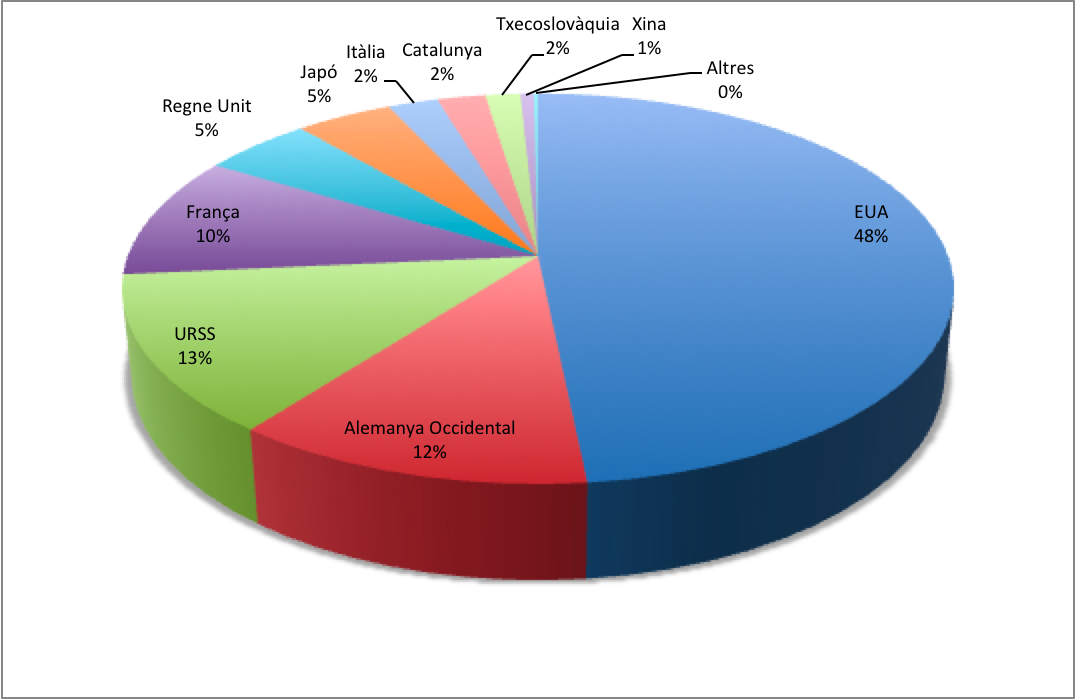 Percentatge de producció total per països durant el període 1930 - 1993 segons Breivik at al 2007